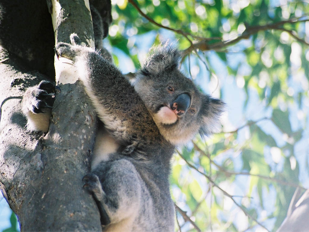 Koala looks down, Kangaroo Island